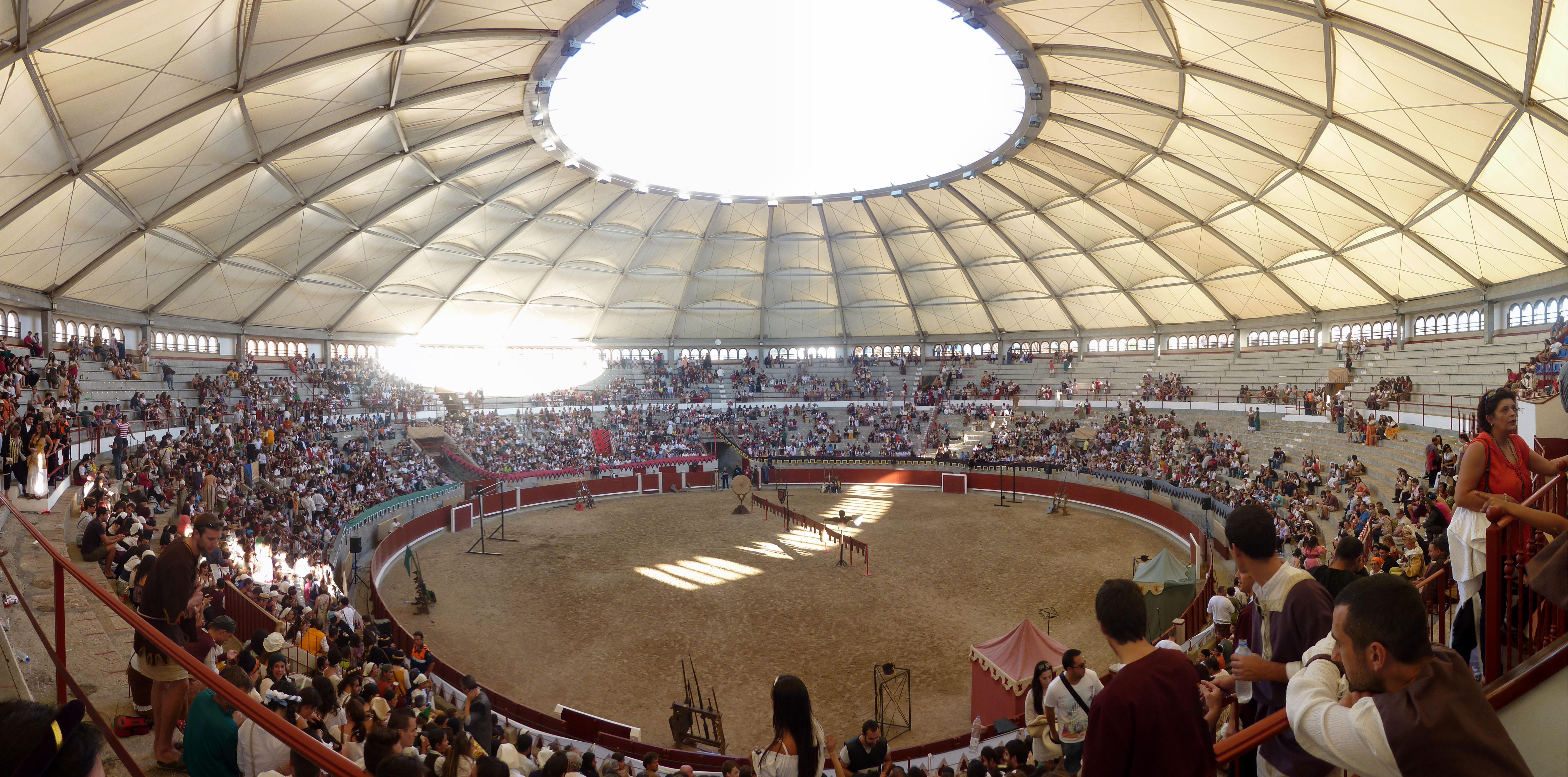 Plaza de toros situada en la ciudad de PontevedraGalego: Praza de touros situada na cidade de Pontevedra